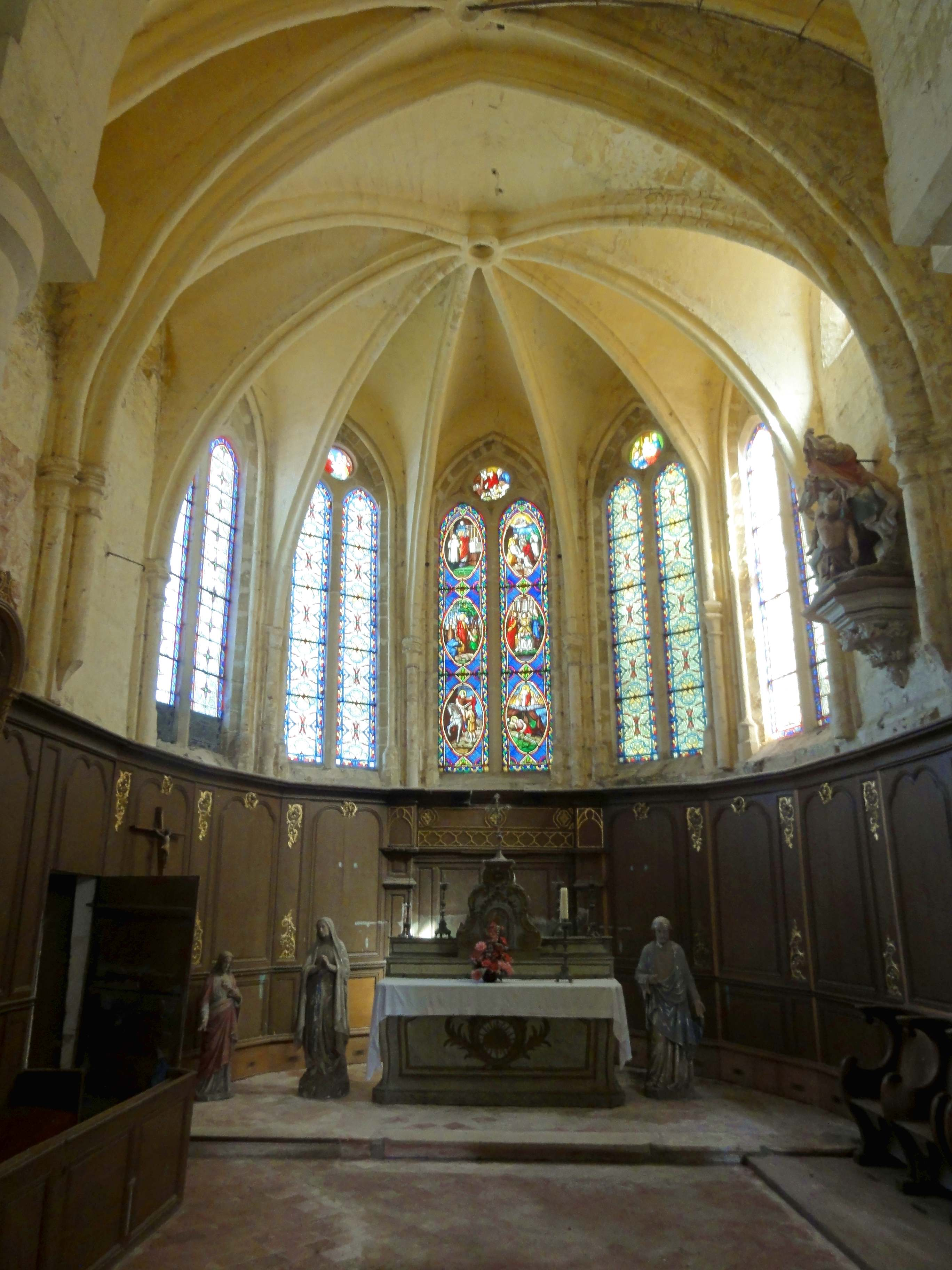 Intérieur de l'église (voir titre).